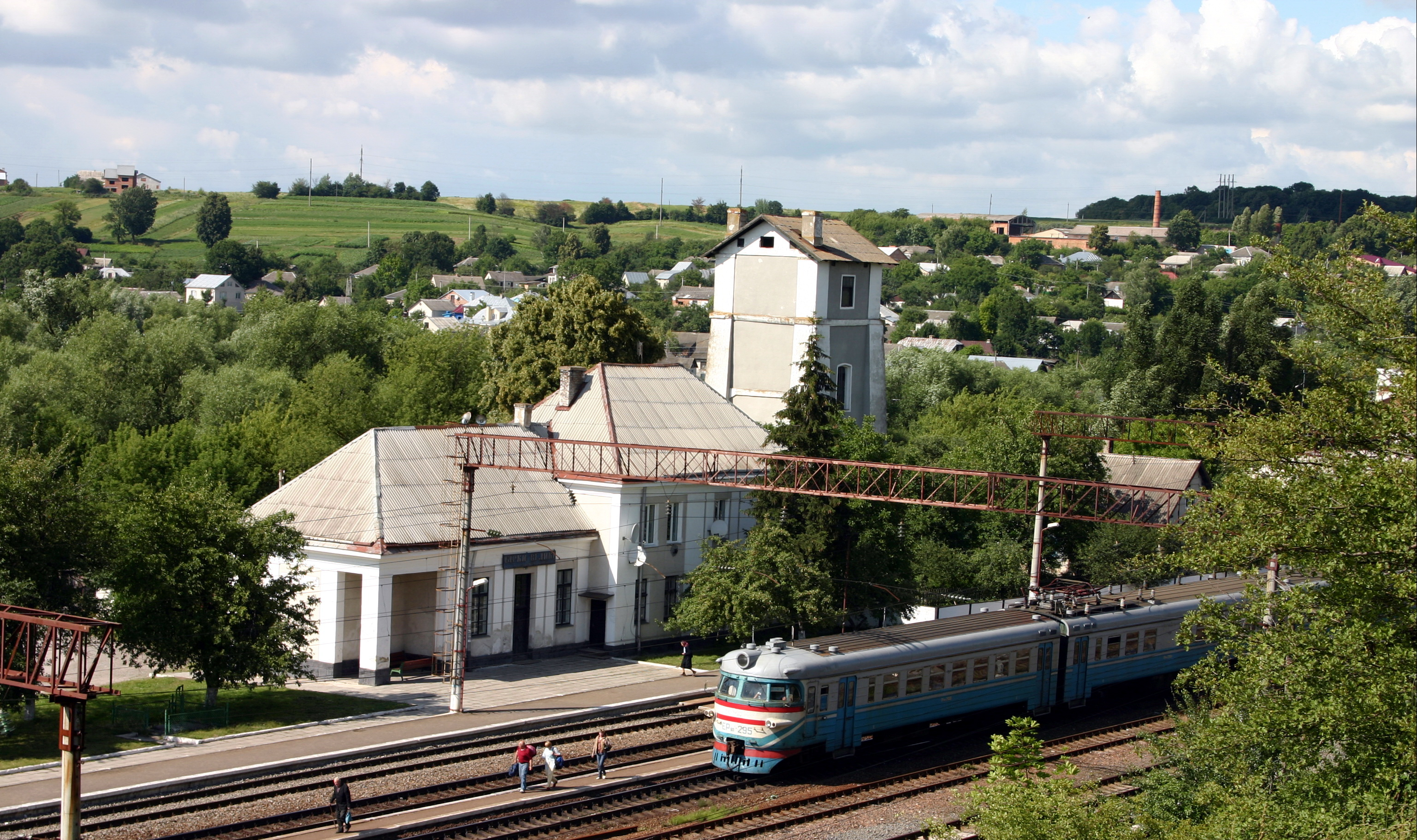 Электропоезд ЭР9п-295, станция Бирки Великие